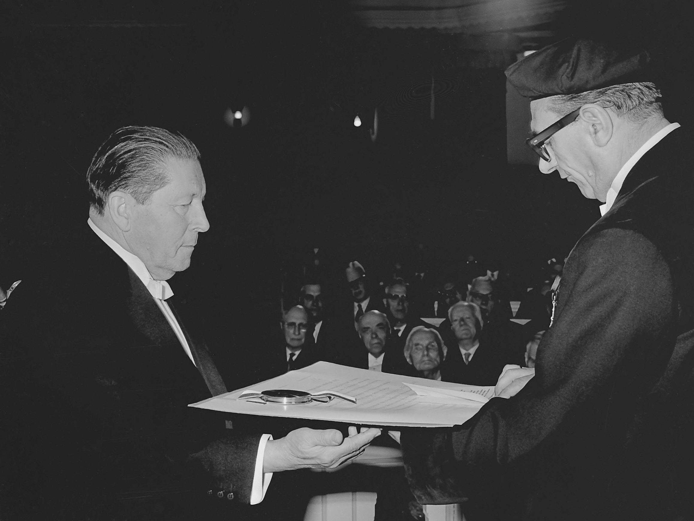 Architect G.Th. Rietveld benoemd tot eredoctor aan de Delftse Technische Hogeschool. De promotor prof. J. H. van den Broek (r) reikt de heer G.Th. Rietveld